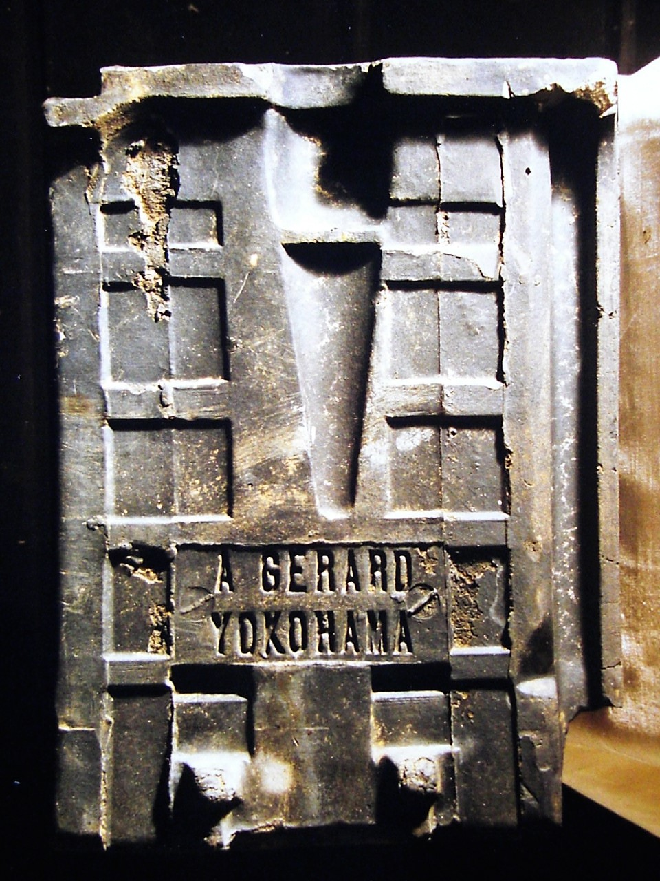 アルフレッド・ジェラール製造黒瓦 1873年以降製造 横浜市中区にて出土